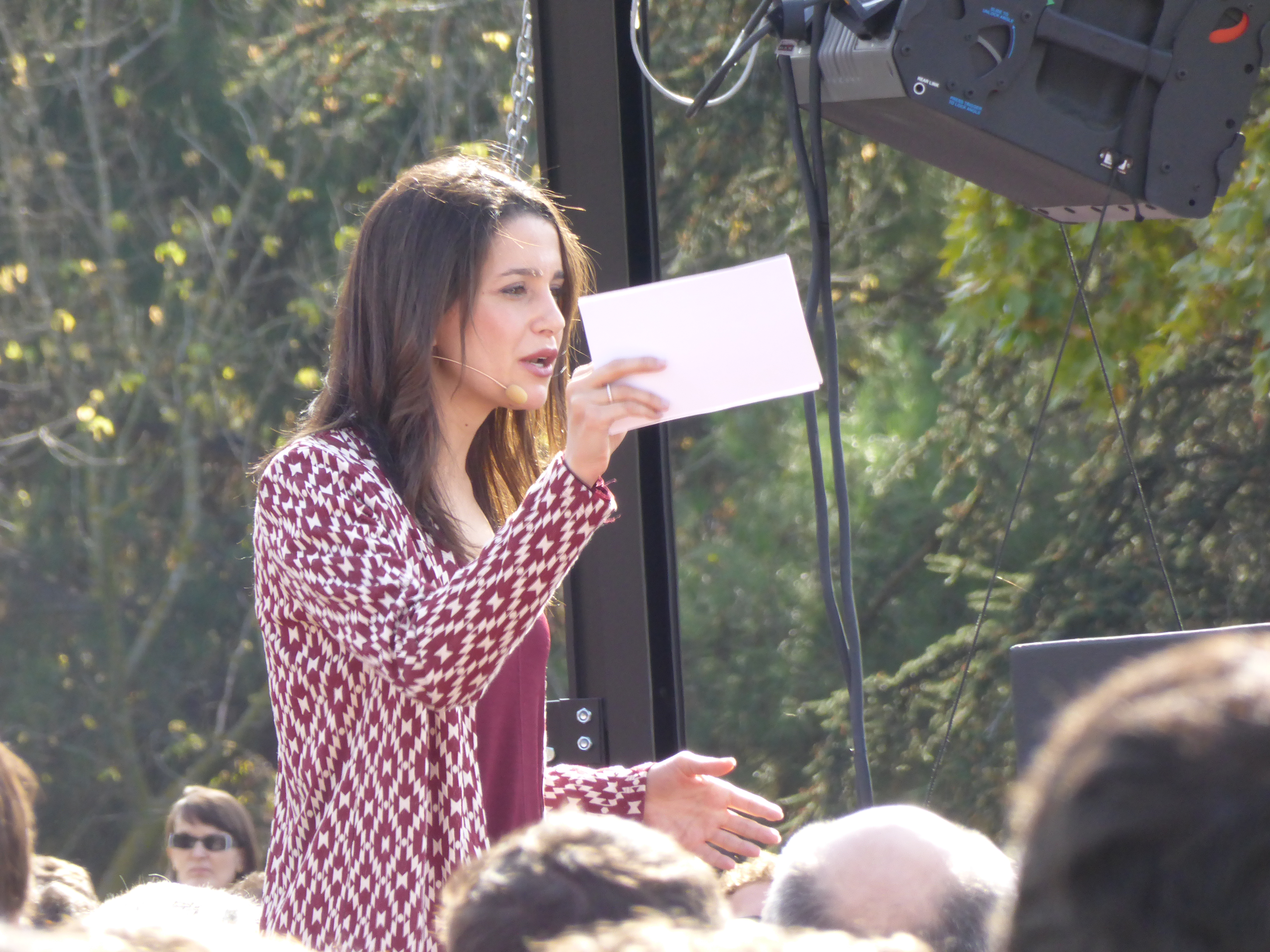 En la explanada del Templo de Debod, en Madrid, durante un acto preelectoral (antes de las elecciones generales), está hablando Inés Arrimadas, diputada del Parlamento de Cataluña, del partido político "Ciudadanos" (Ciutadans - Partit de la Ciutadania), jefe de la oposición en dicho parlamento..